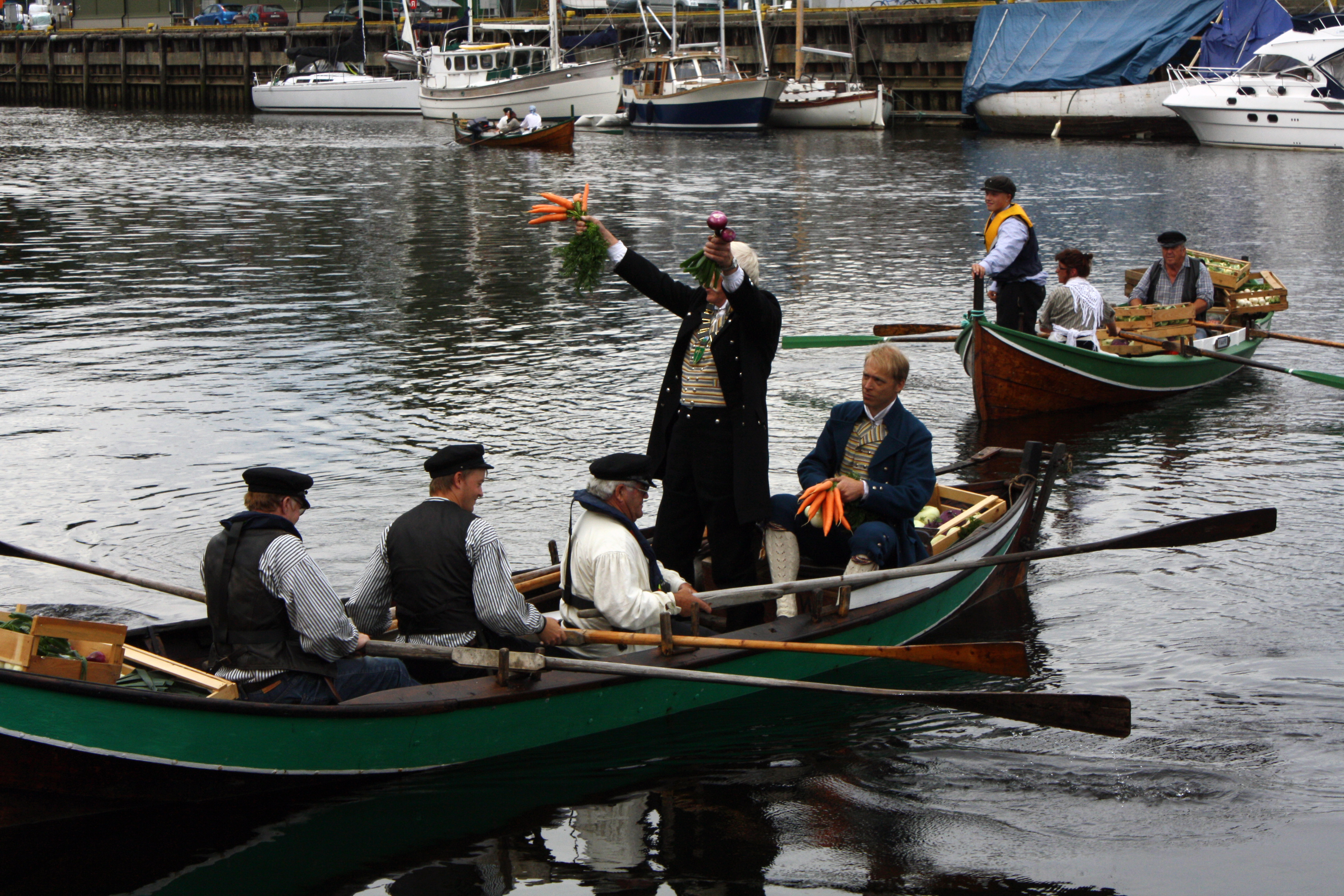 Grønnsakene ros i land i Ravnkloa. Frosta-ordfører Lars Myraunet står klar til å dele av kommunens kjøkkenhage.